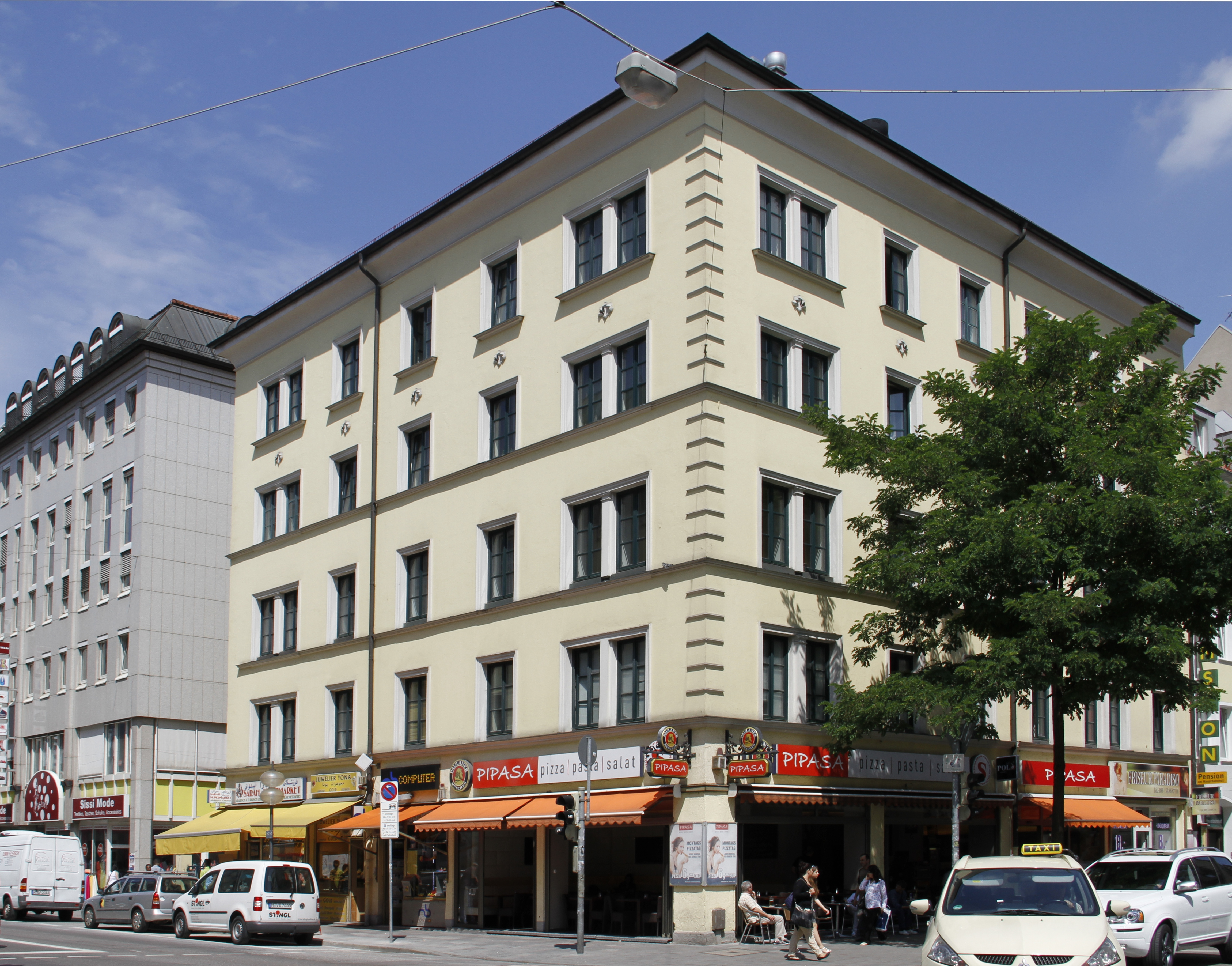 Schwanthaler Strasse 24, München Ludwigsvorstadt. Mietshaus in klassizistischer Tradition zwischen 1870-1880. Ursprünglich wohl mit neurennaissance Fassade. Heutiges Erscheinungsbild vermutlich in den 1920er Jahren stark vereinfacht.